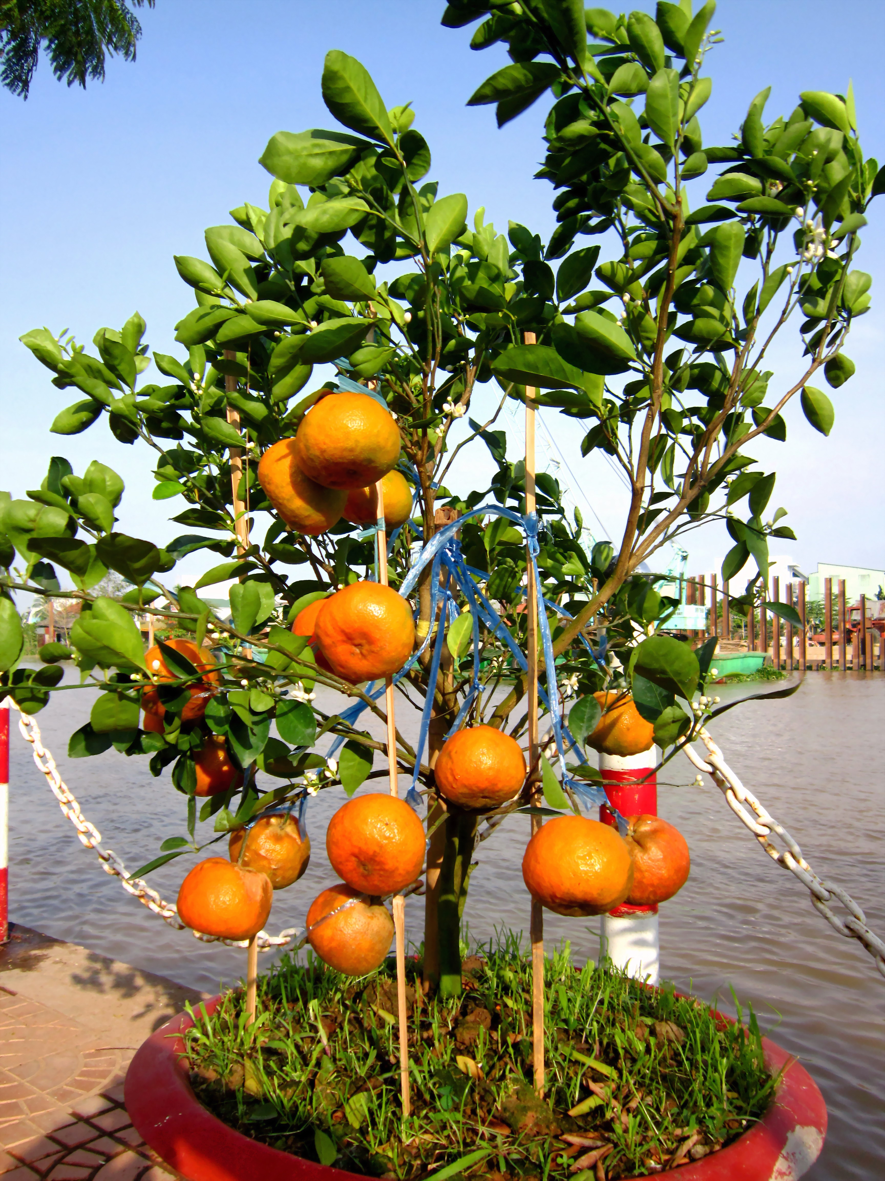 Quýt hồng được trồng làm cây cảnh ở miền Nam Việt Nam.